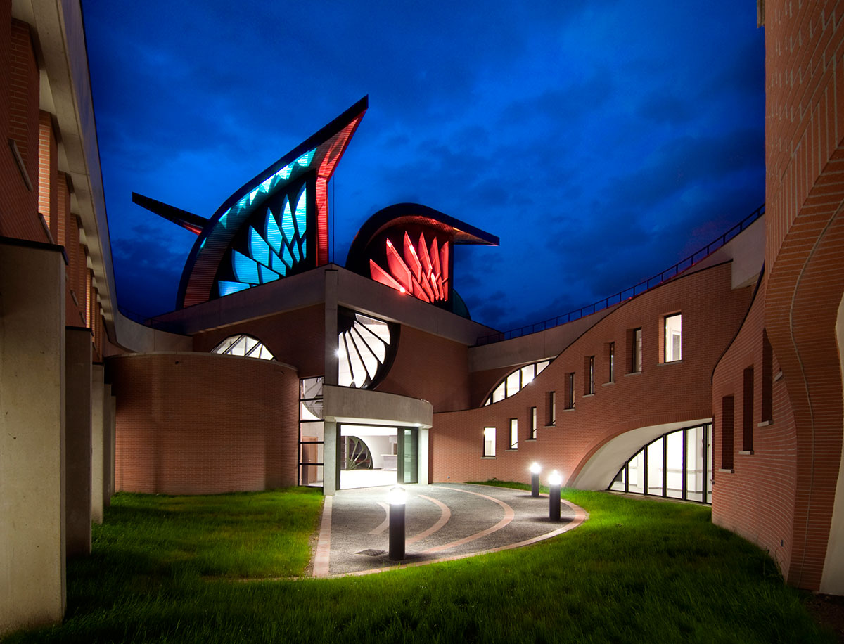 Hôpital des Mureaux, Ricardo Porro - Renaud De La Noue architectes